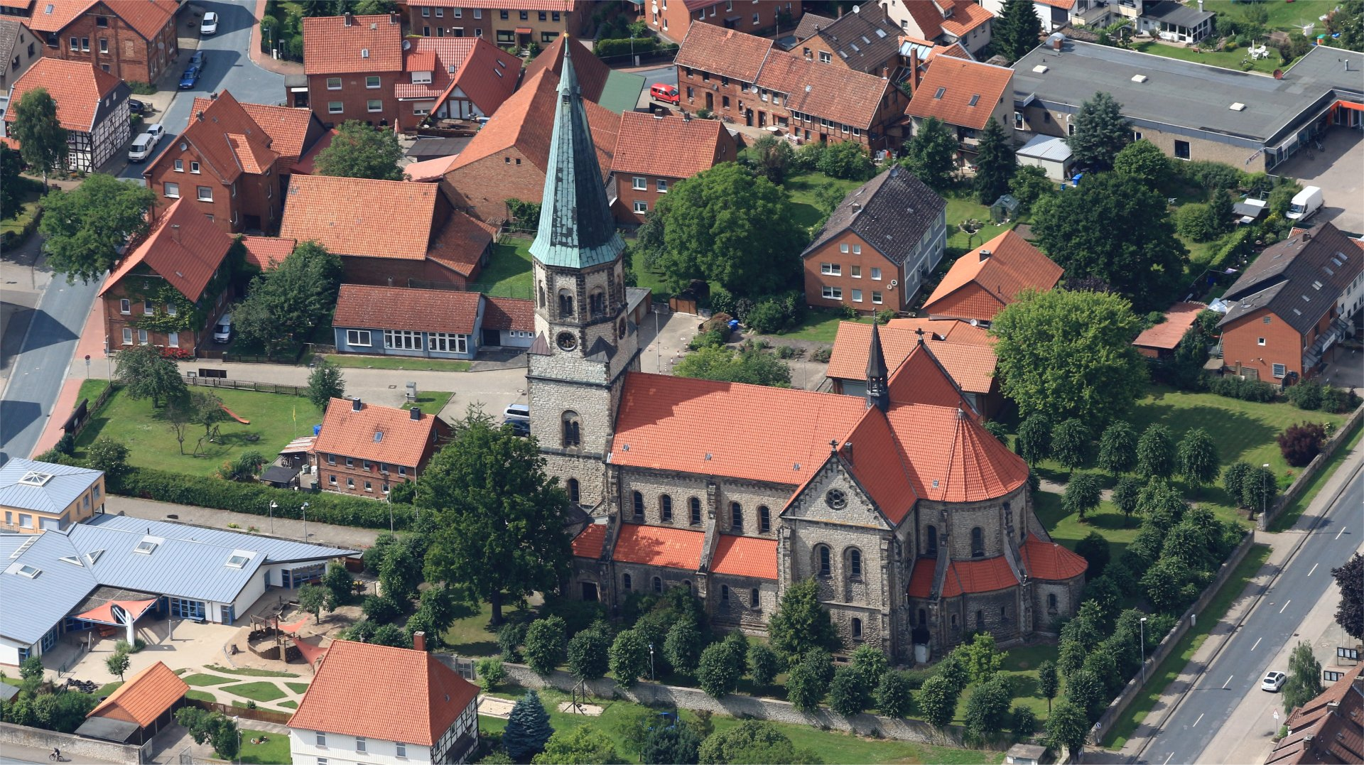 St Cäcilia Kirche Harsum, Luftbild